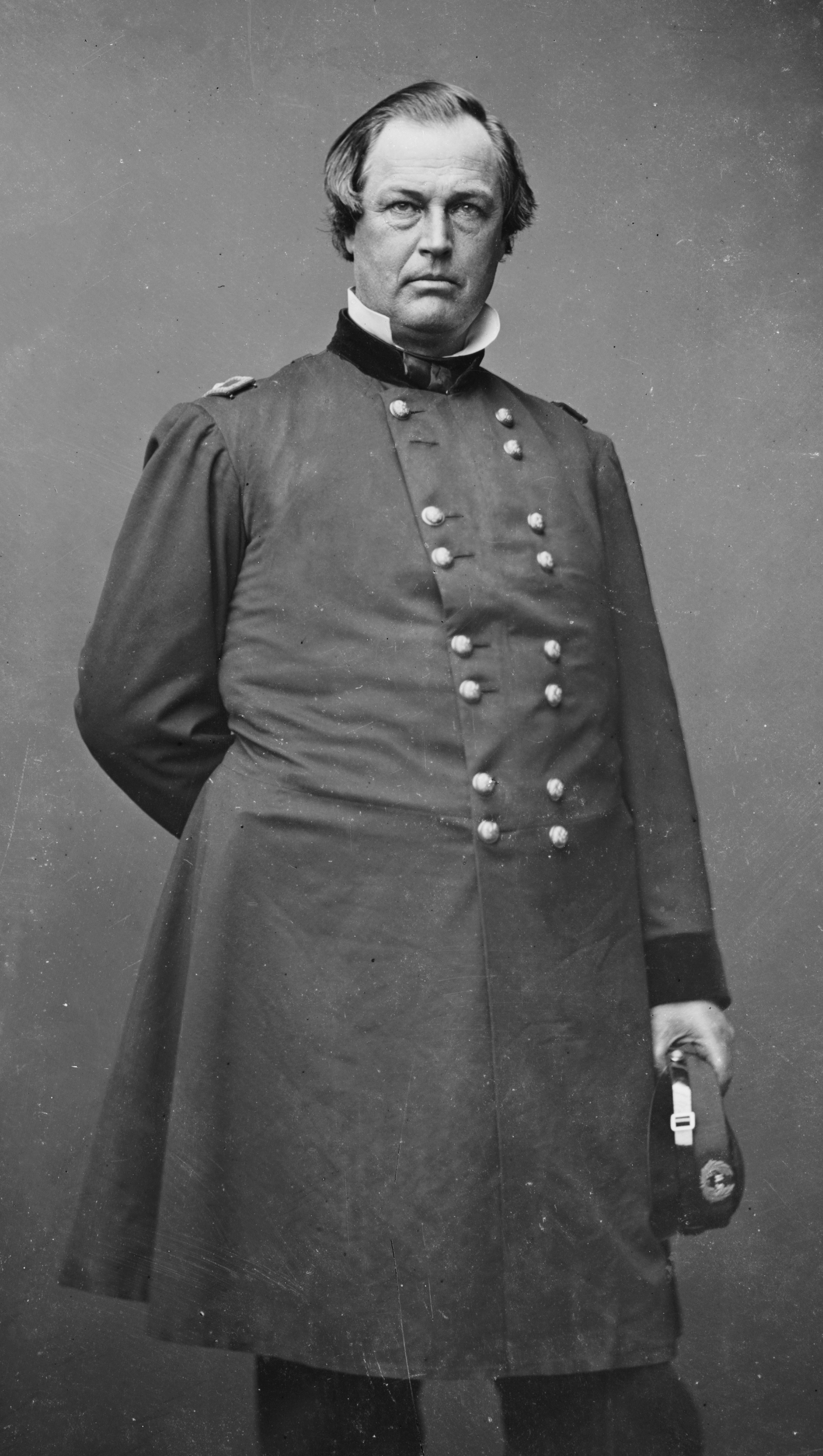 General Denver John